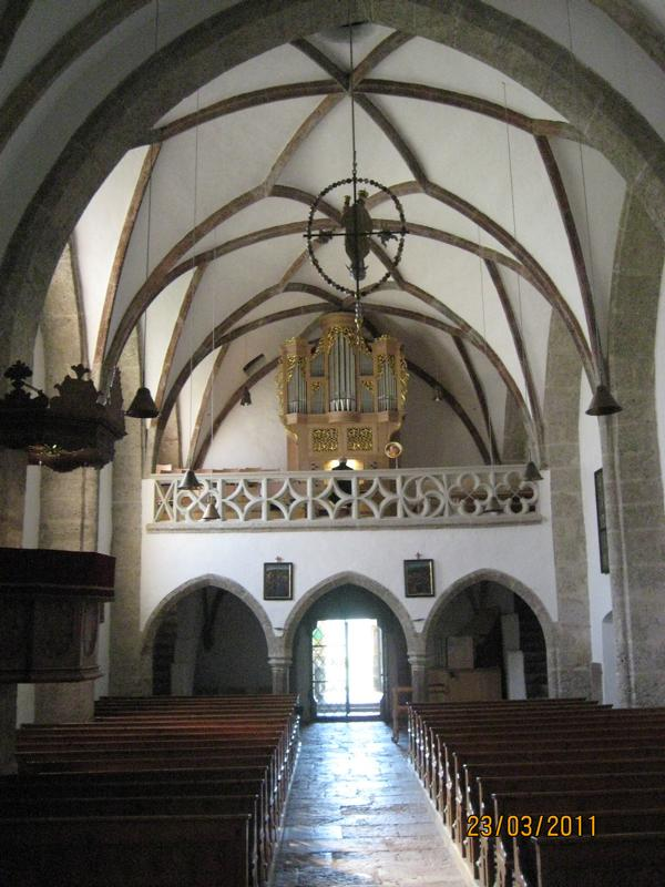 Orgel Scheffau am Tennengebirge